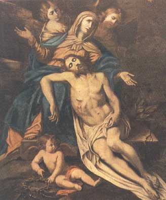 Pietà